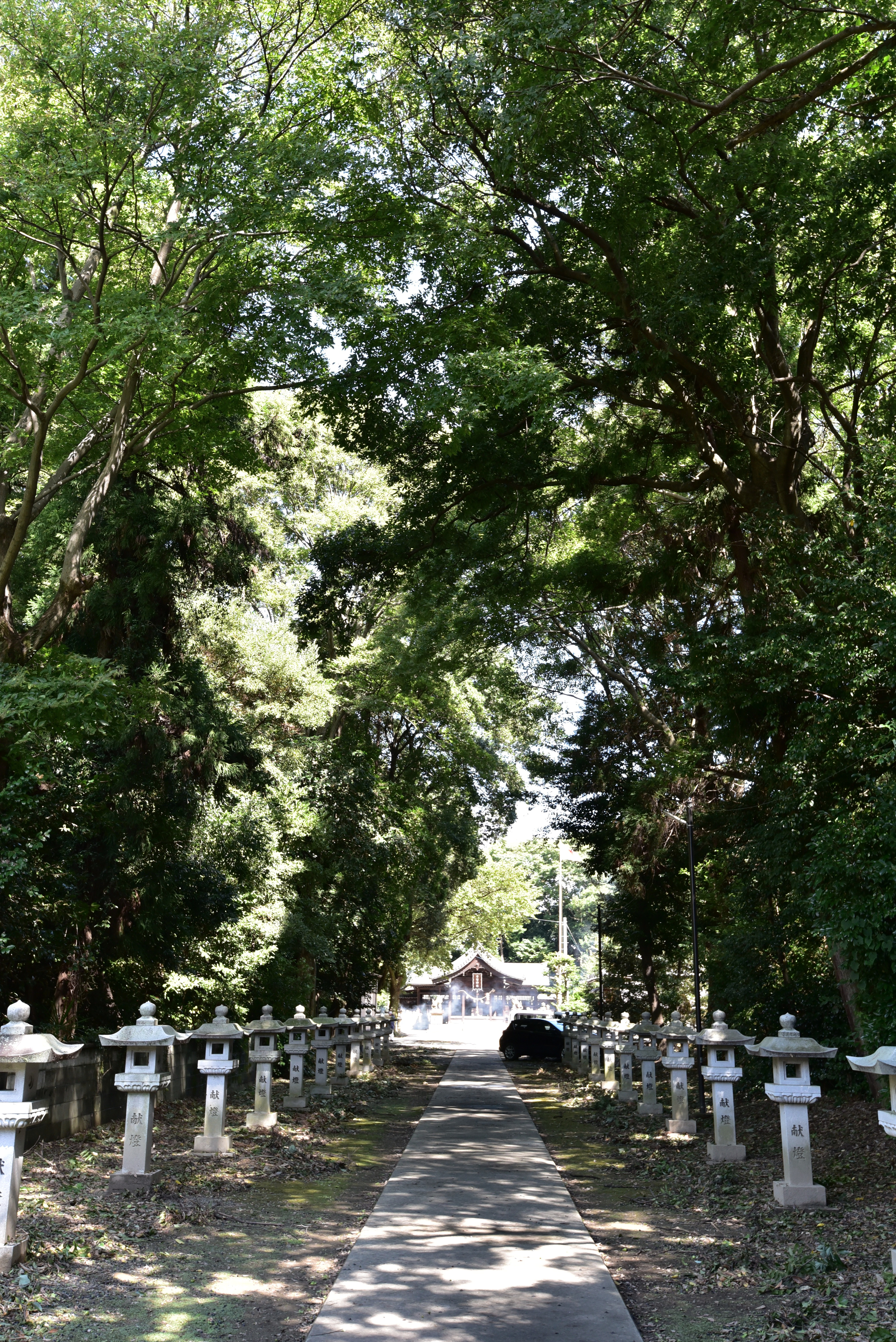 布智神社参道